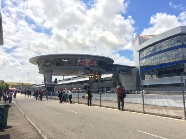 Sale el sol en Jerez tras unos primeros entrenos bajo la lluvia